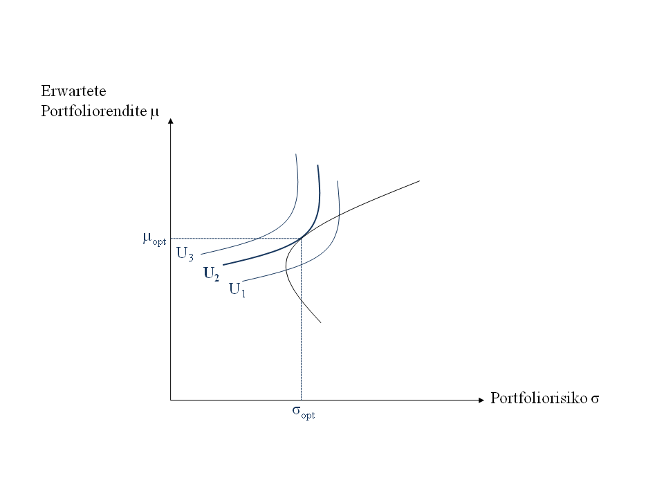 Grafik